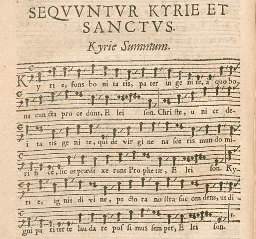 Kyrie Summum (Kyrie fons bonitatis) in Franz Eler: Cantica Sacra 1588, S. XIIII